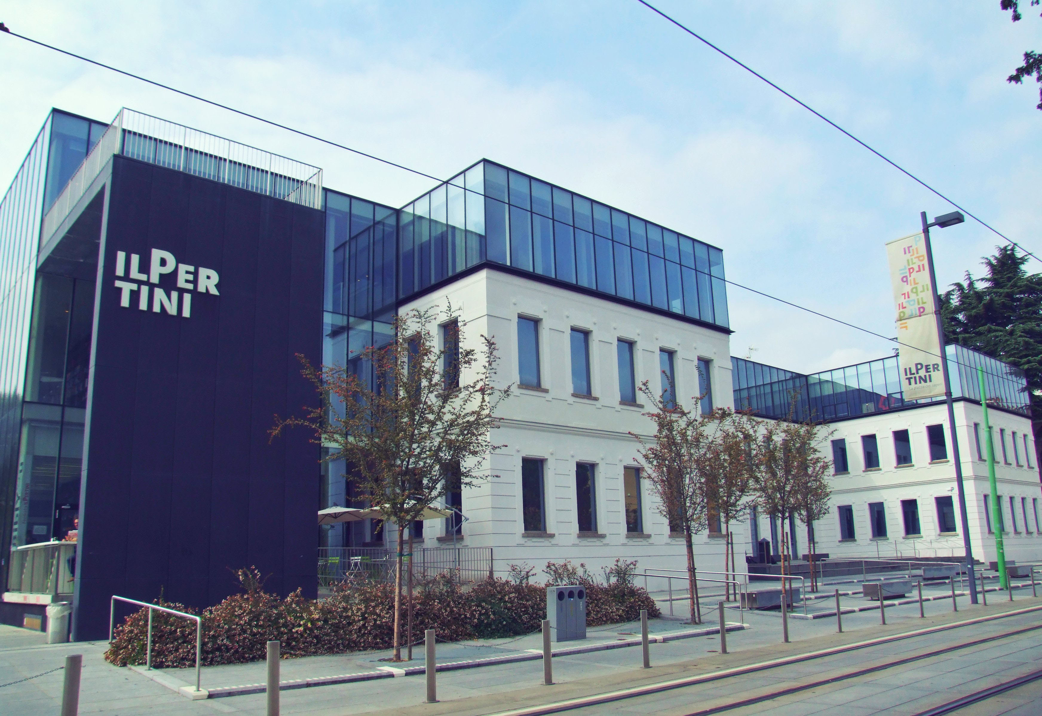 Il Pertini - Biblioteca Comunale This is a photo of a monument which is part of cultural heritage of Italy.